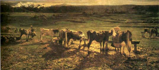 An der Stange, 169x389,5cm, Roma, Galleria Nazionale d'Arte Moderna